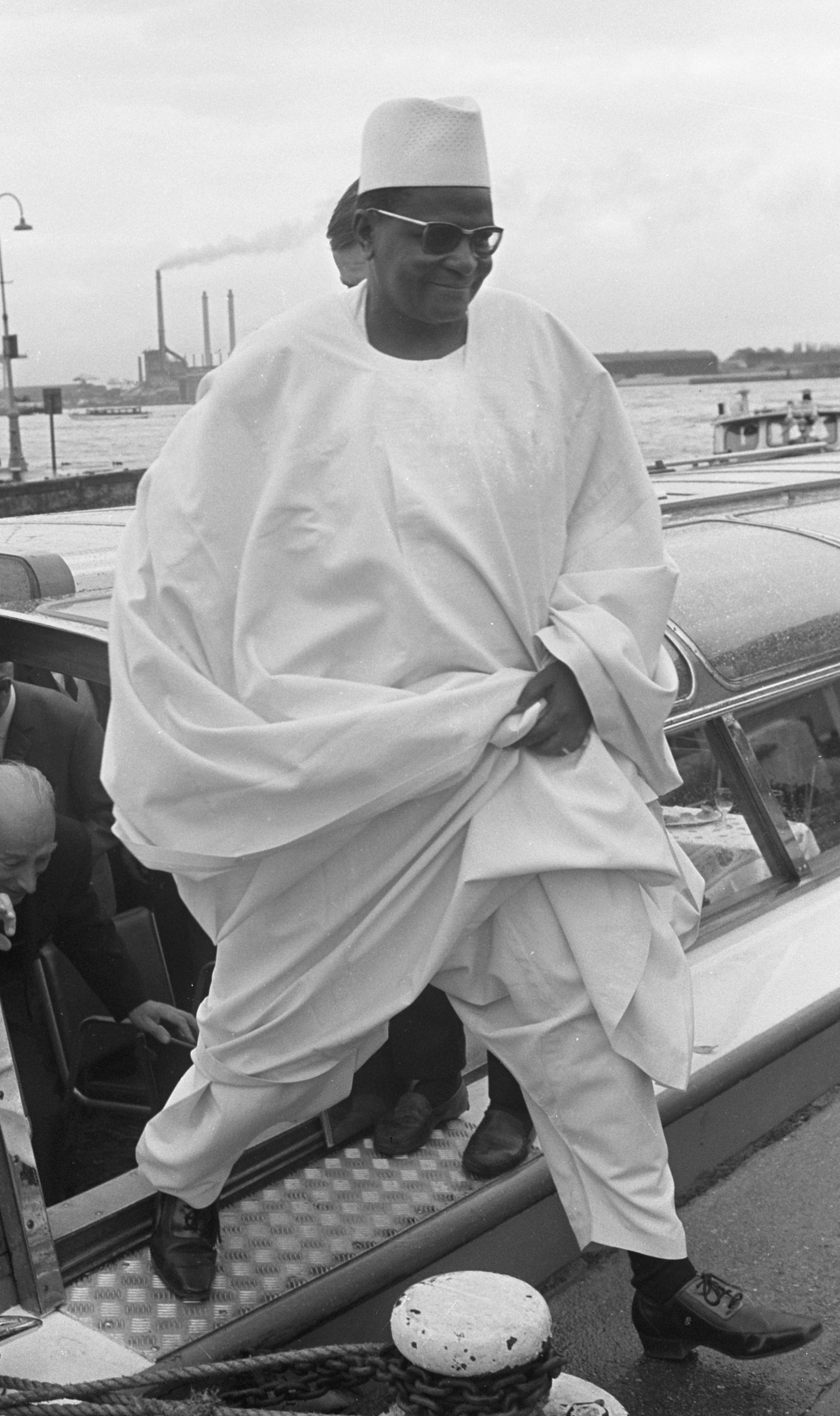 Bezoek President van Niger, rechts Z.E. Diori Hamani stapt uit na de rondvaart